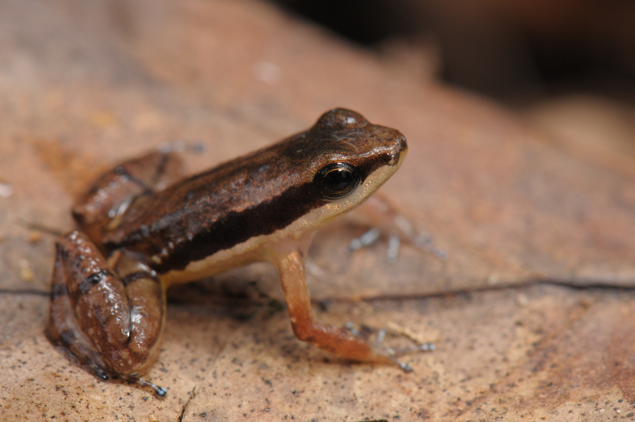 Sapo-flecha - Allobates olfersioides - Espécie endêmica da Mata Atlântica e considerada ameaçada de extinção, a imagem foi registrada na Bahia.